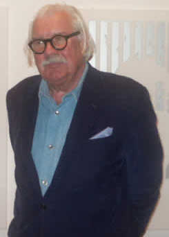 Werner Berges, kunstschilder bij zijn grafisch werk in het Plakatmuseum in Emmerich